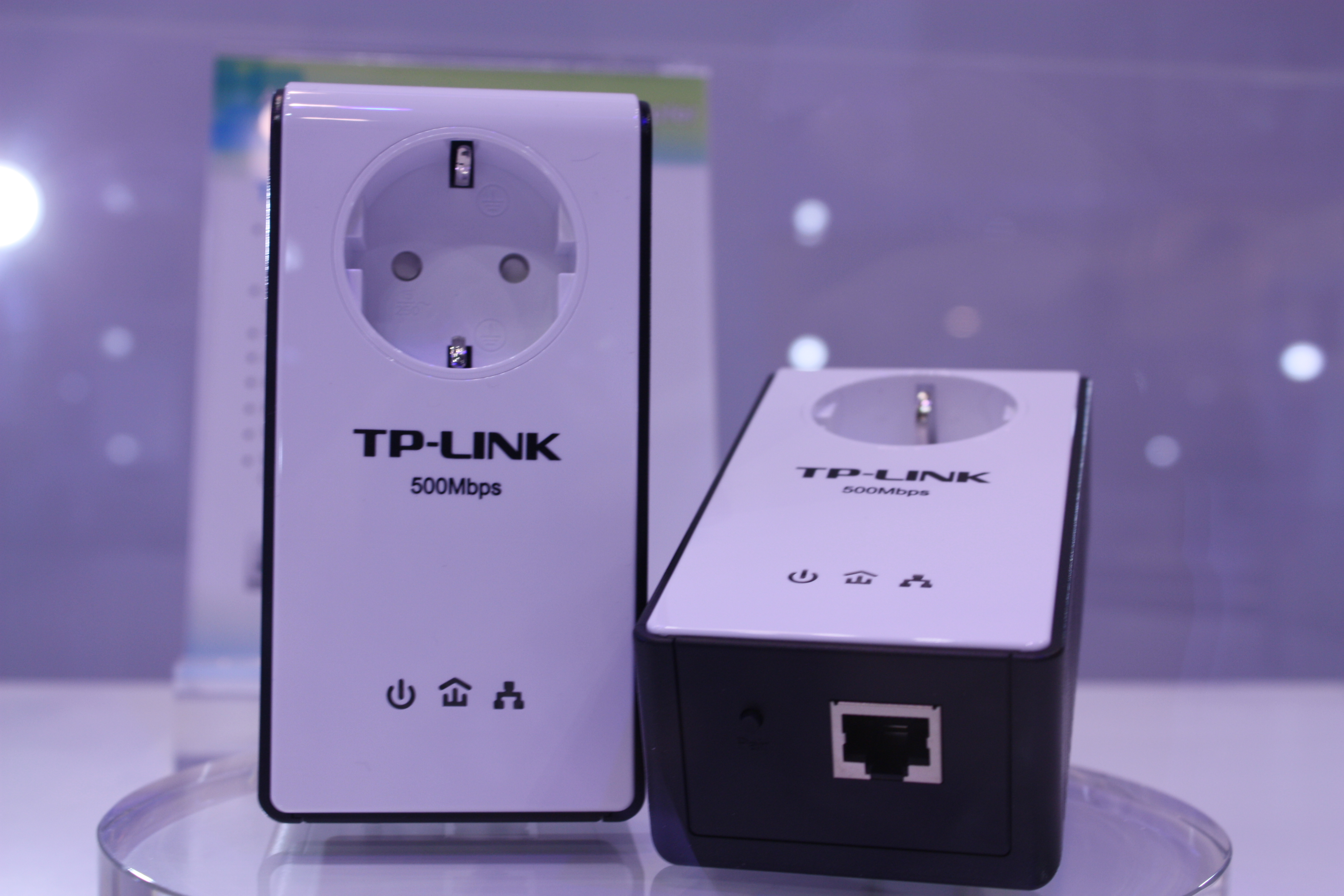 Internationale Funkausstellung 2012, TP-Link